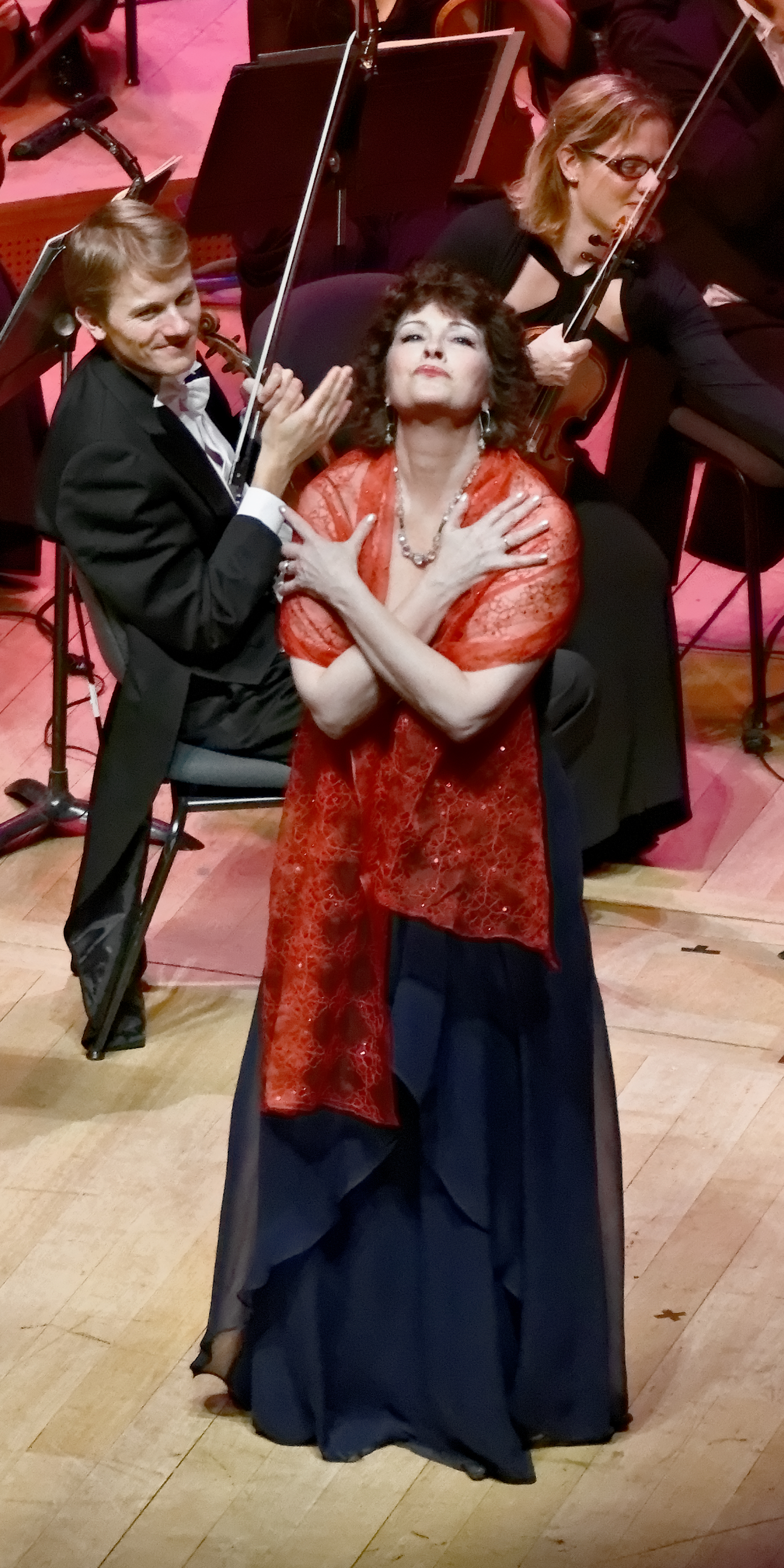 Jennifer Larmore. Concert de fin d'année 2013, Auditorium Maurice-Ravel, Lyon (France)